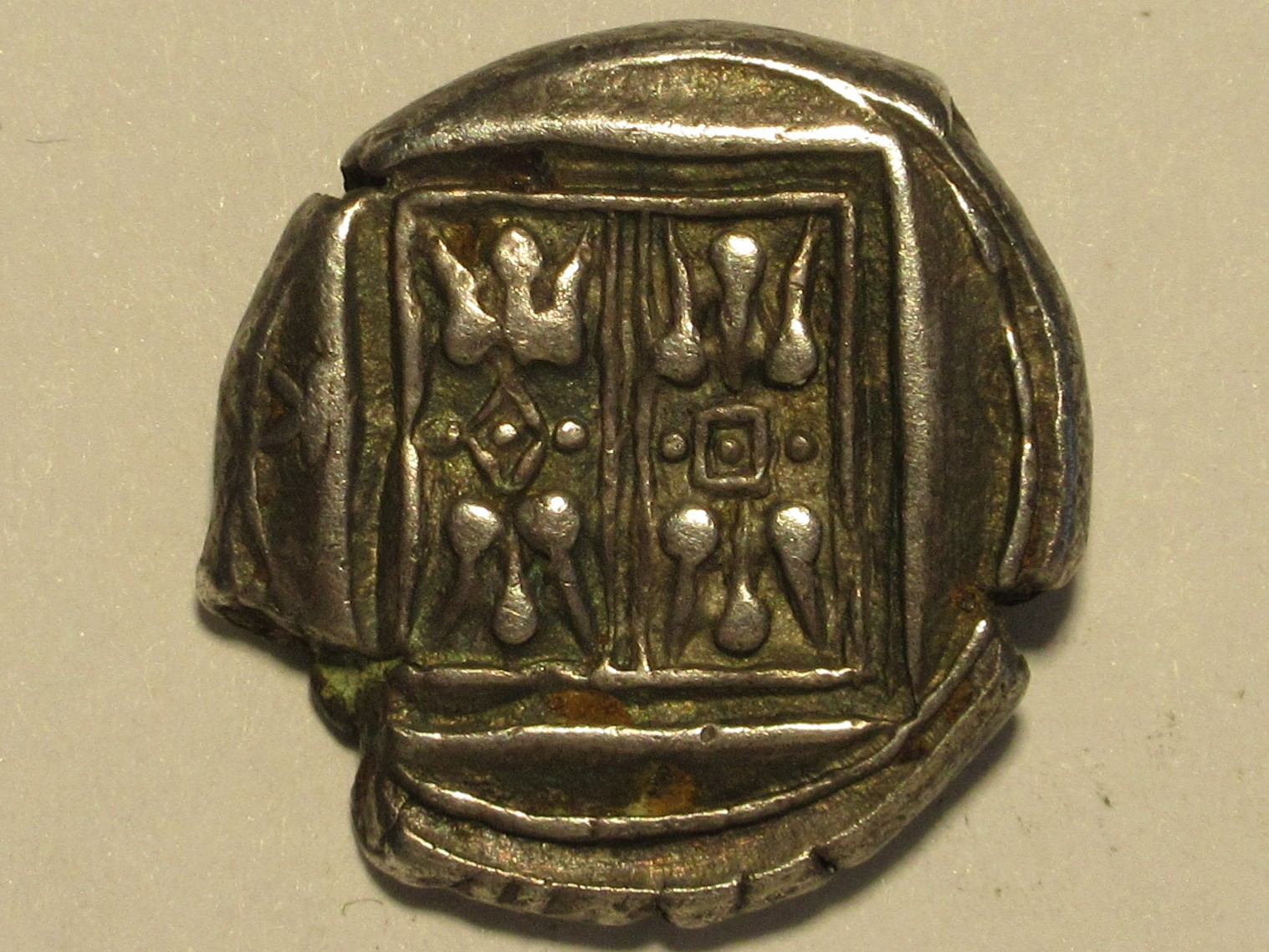 Rückseite des Staters, stilisierte Doppelblüte in Zierrechtecken